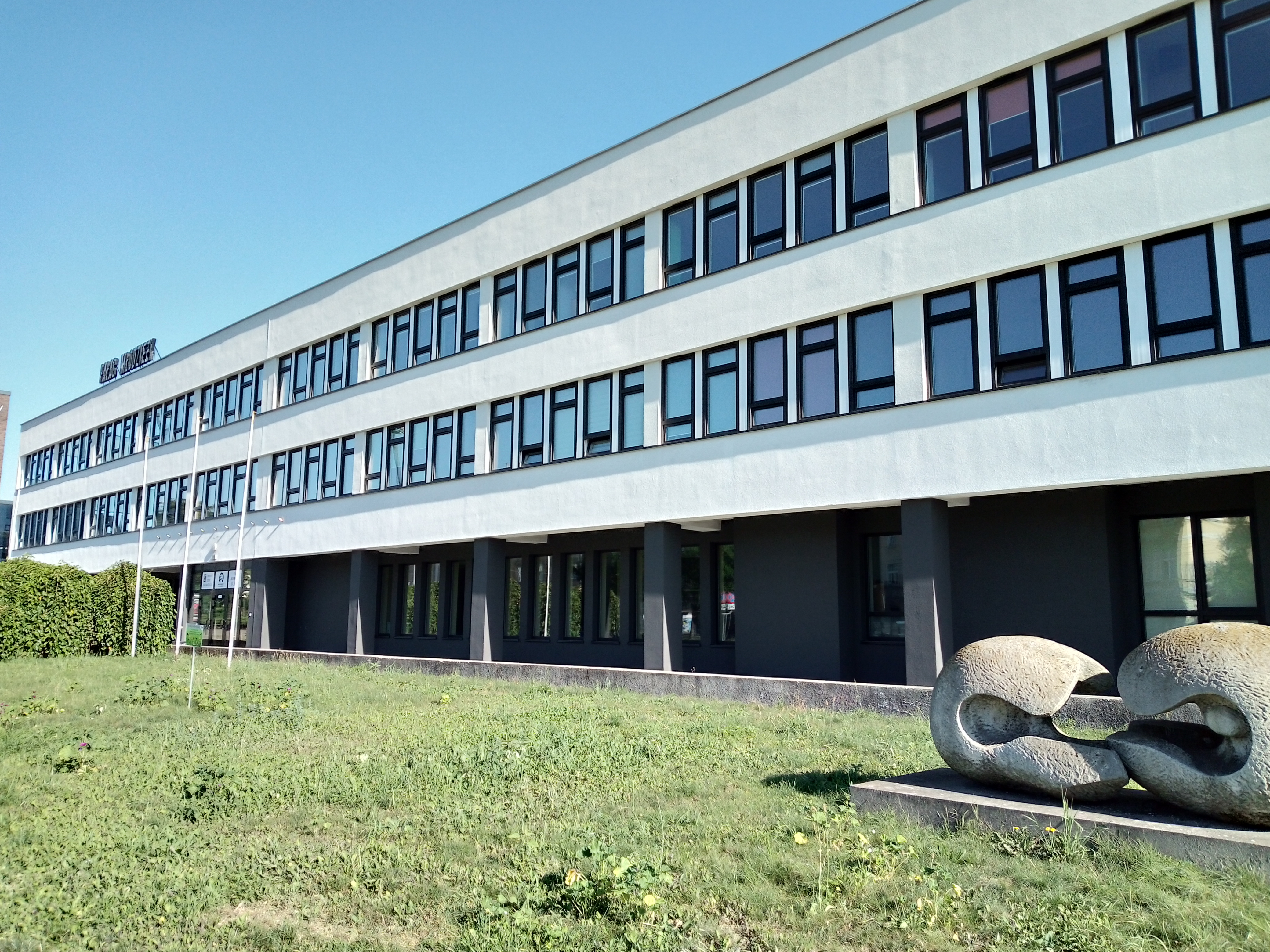 Pałac Młodzieży w Bydgoszczy